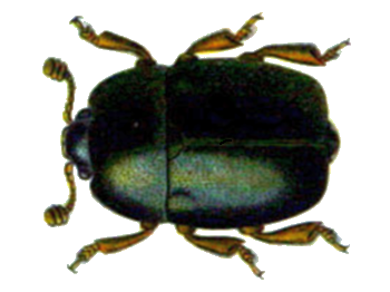 Nitidula rufipes